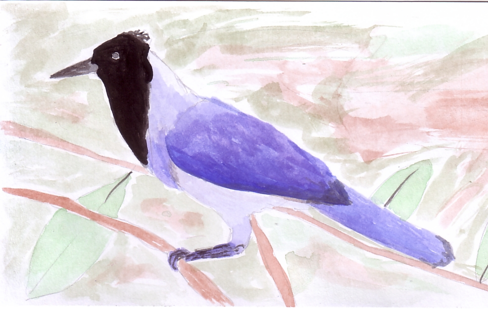 desegnaĵo de viola garolo